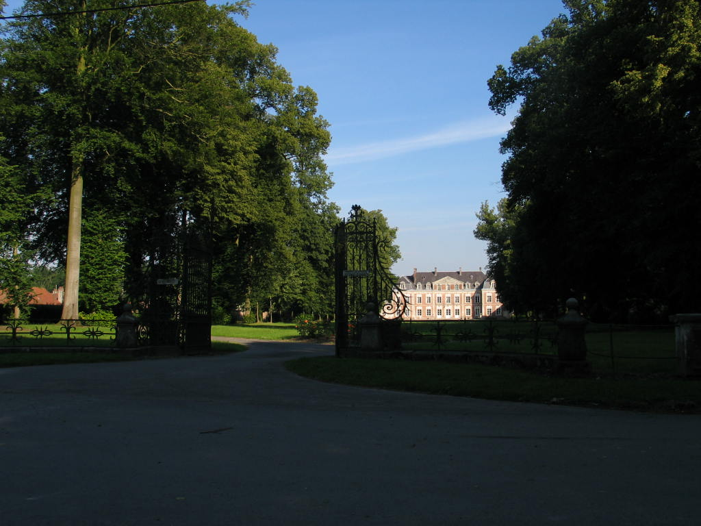 Kasteel van Tramecourt - eigen foto